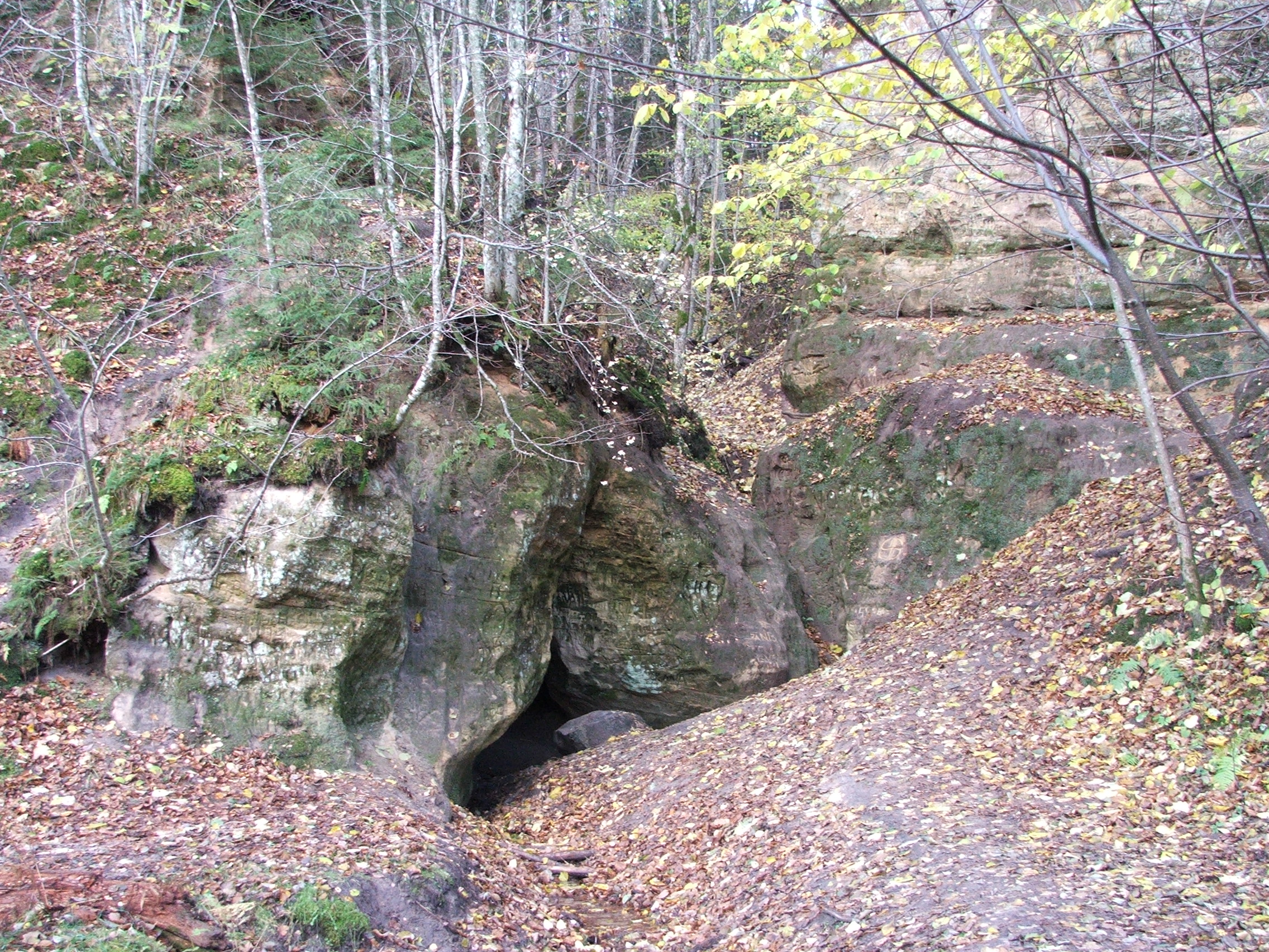 Inčukalna Velna ala - kulta vieta, Inčukalna pagasts